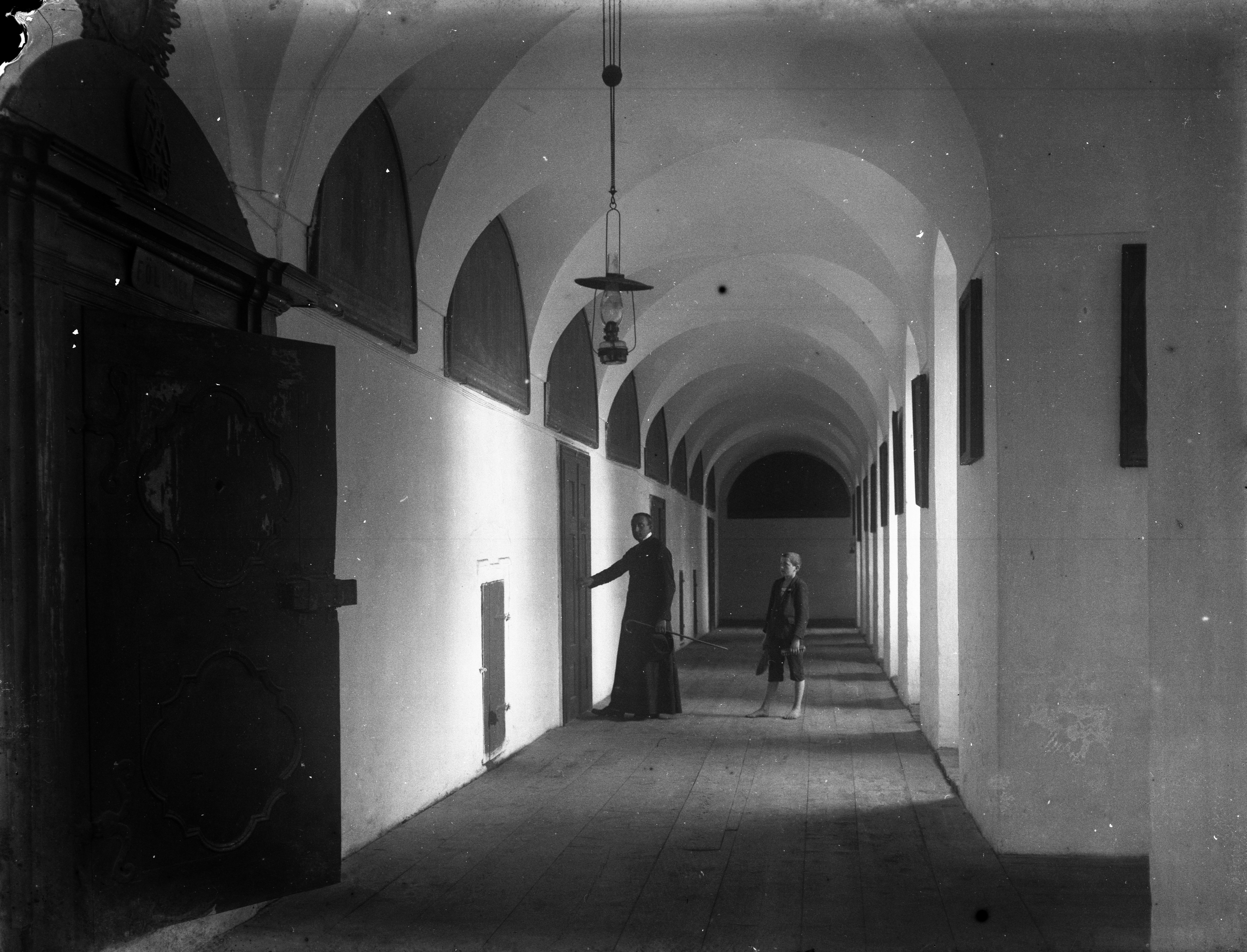 a piarista rendház folyosója. Location: Slovakia, Podolínec Tags: architecture, monastery Title: a piarista rendház folyosója.